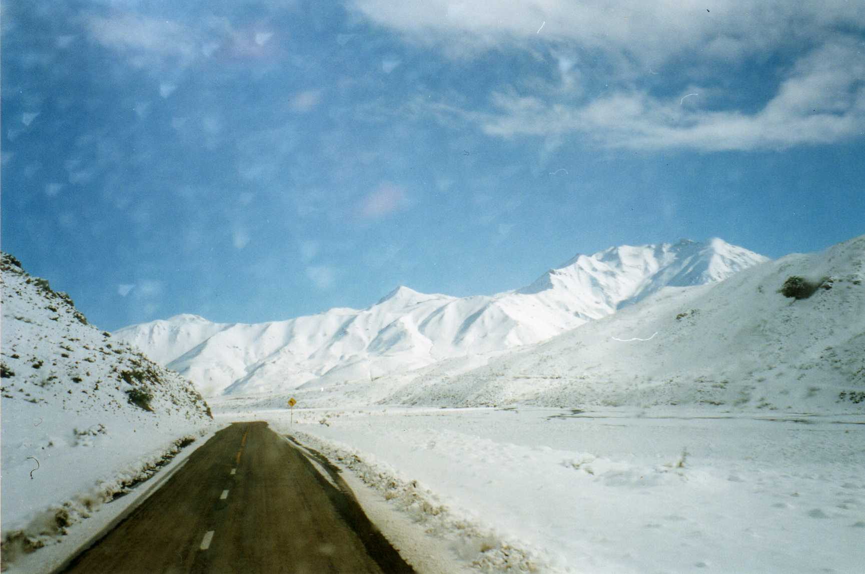 Ruta al Valle de Las Leñas, en Mendoza, Argentina.